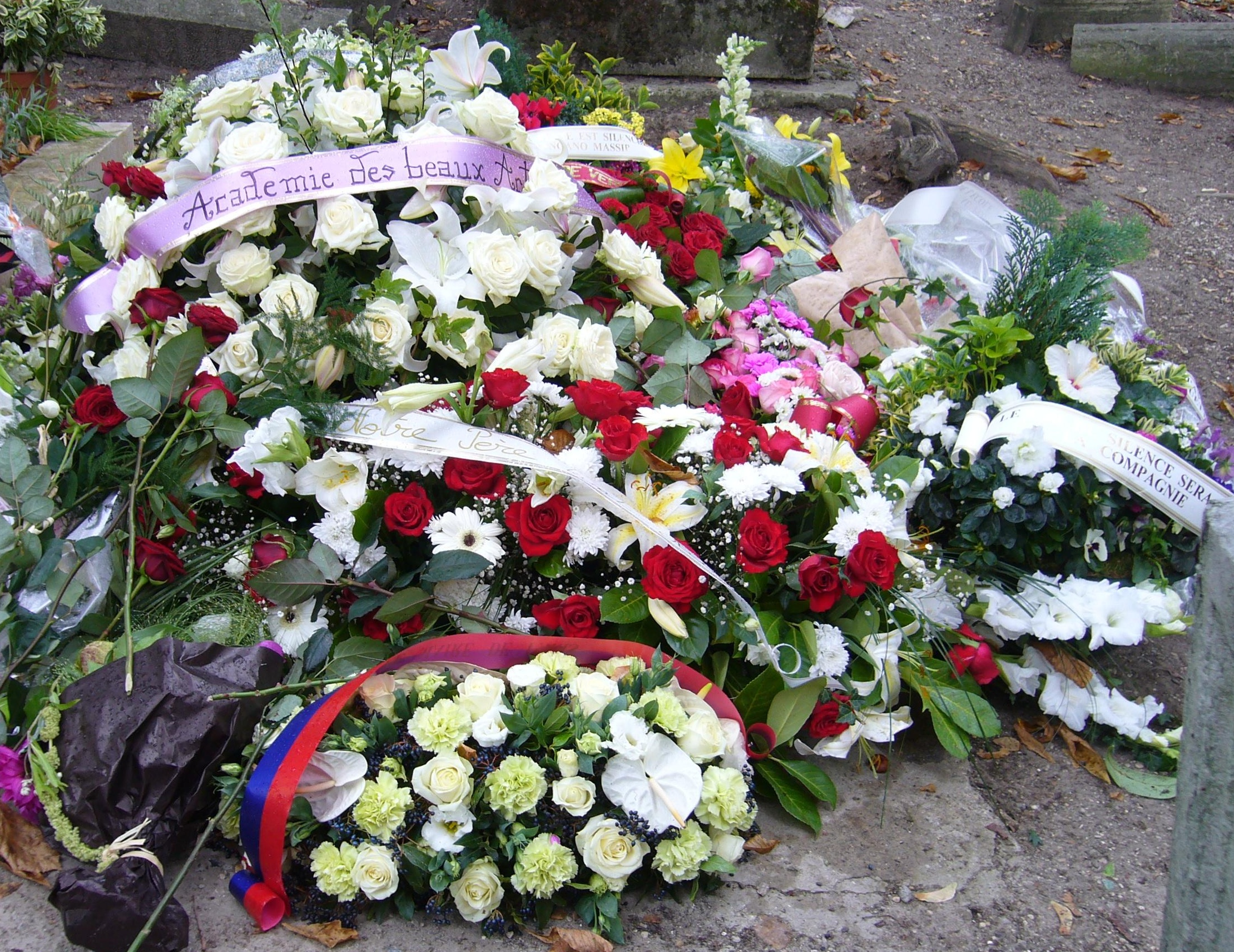 Bild von der Beisetzung des weltberühmten Pantomimen Marcel Marceau, welcher am 22. Sept. 07 verstorben ist.